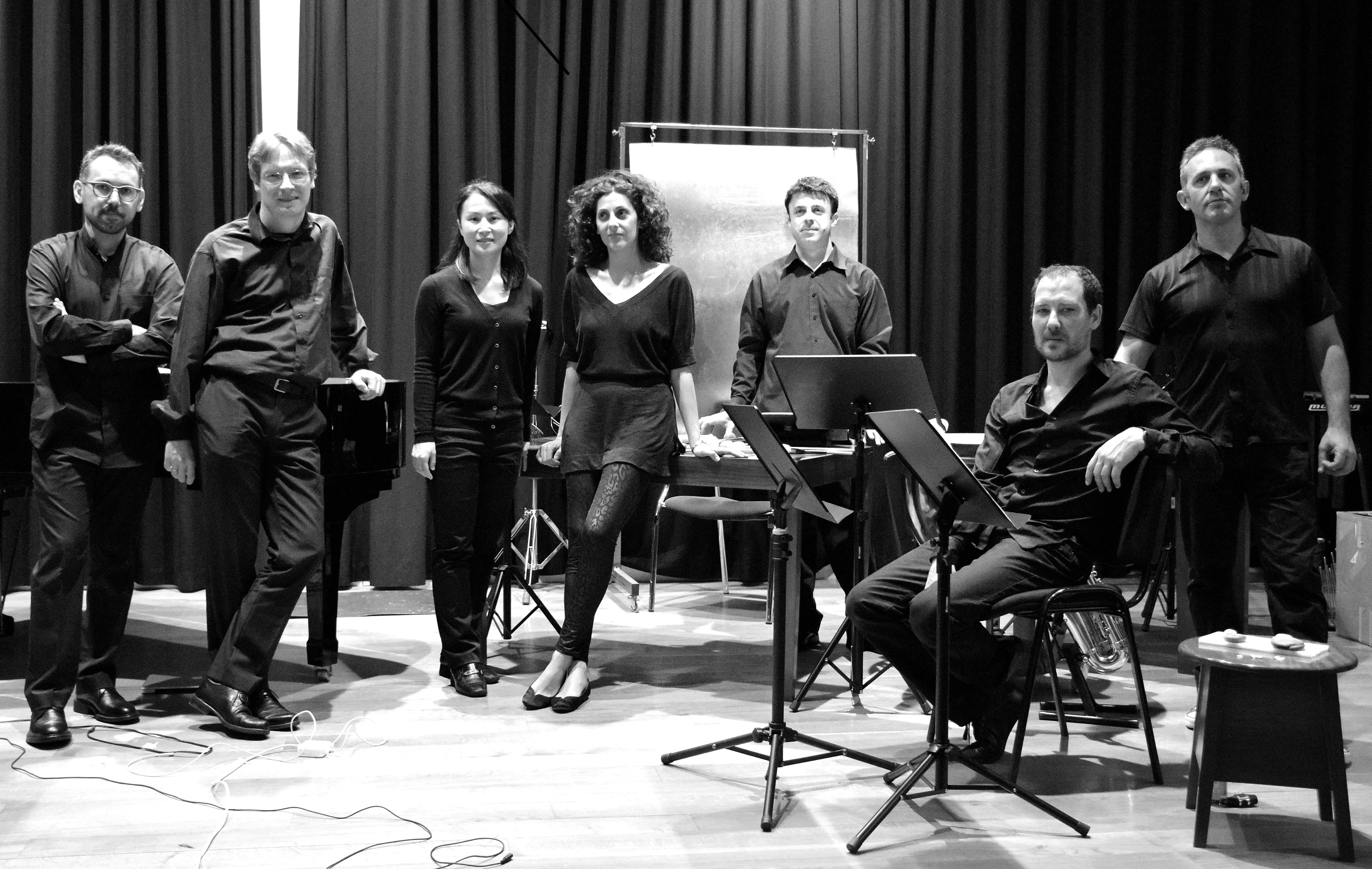 Vertixe Sonora Ensemble en el CGAC